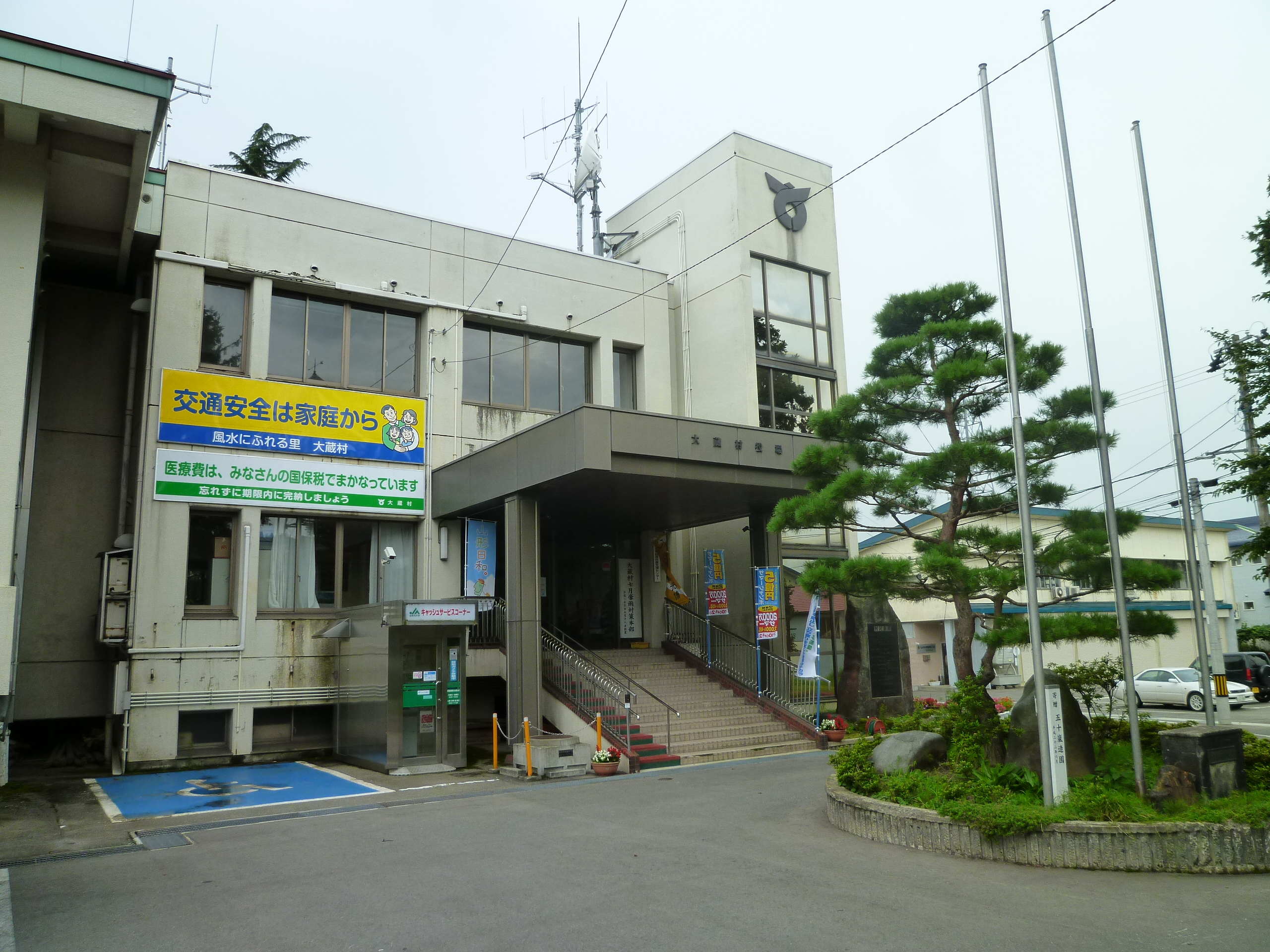 大蔵村役場。 山形県最上郡大蔵村清水に所在。